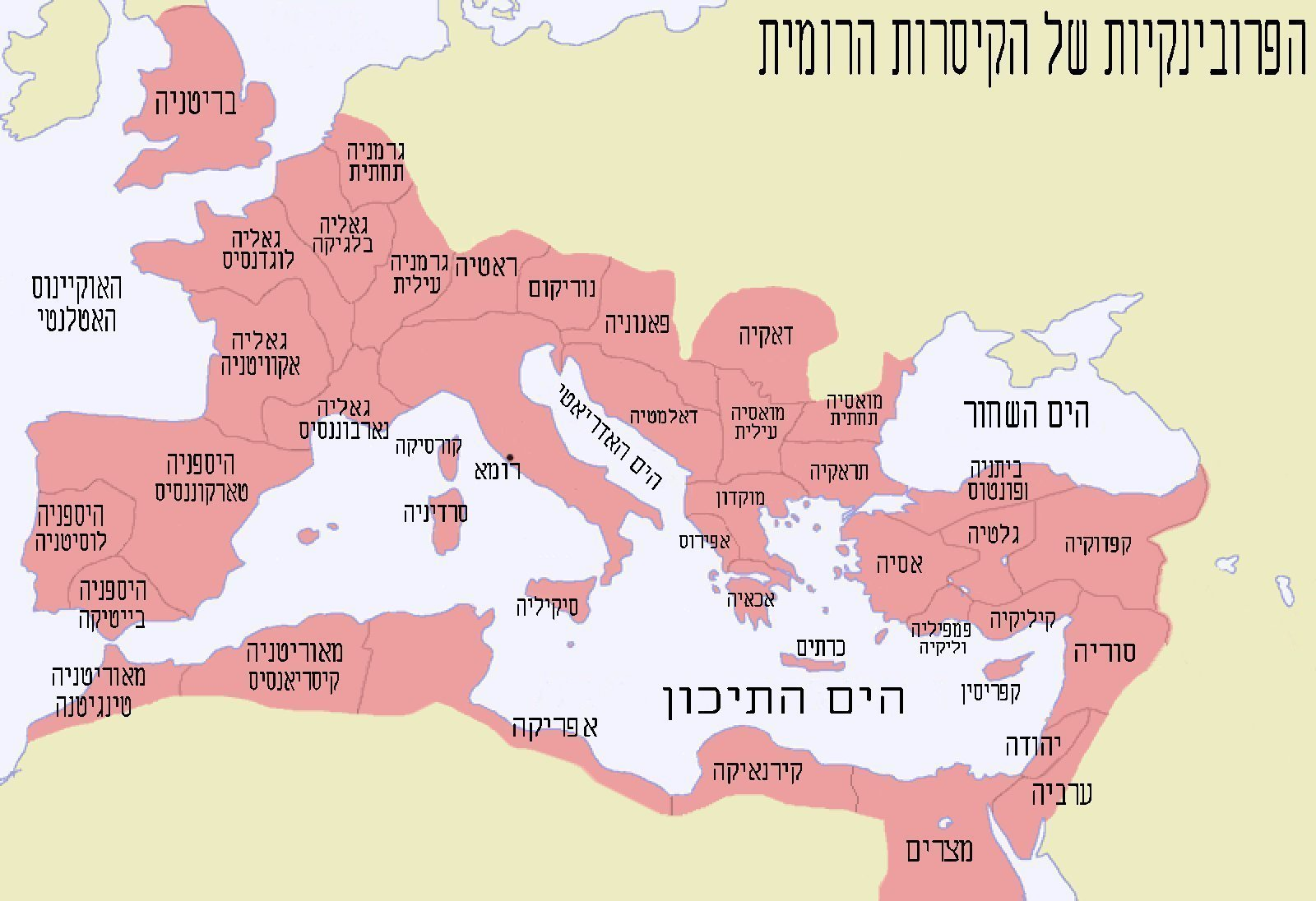 מפה של החלוקה לפרובינקיות בקיסרות הרומית